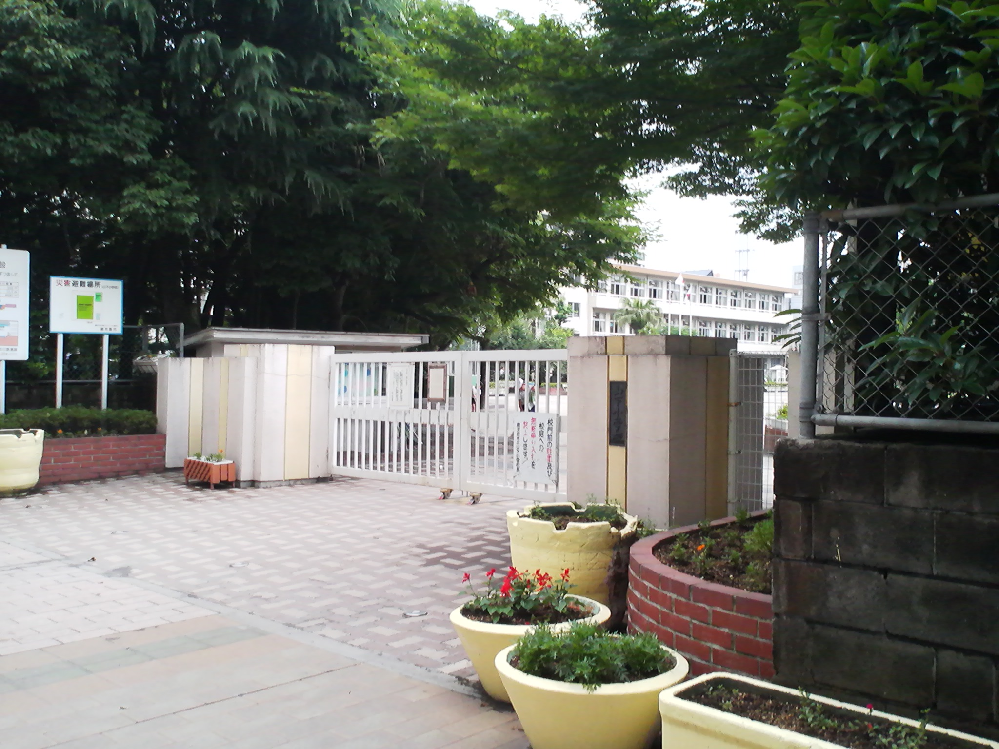 鹿児島市立山下小学校の外観